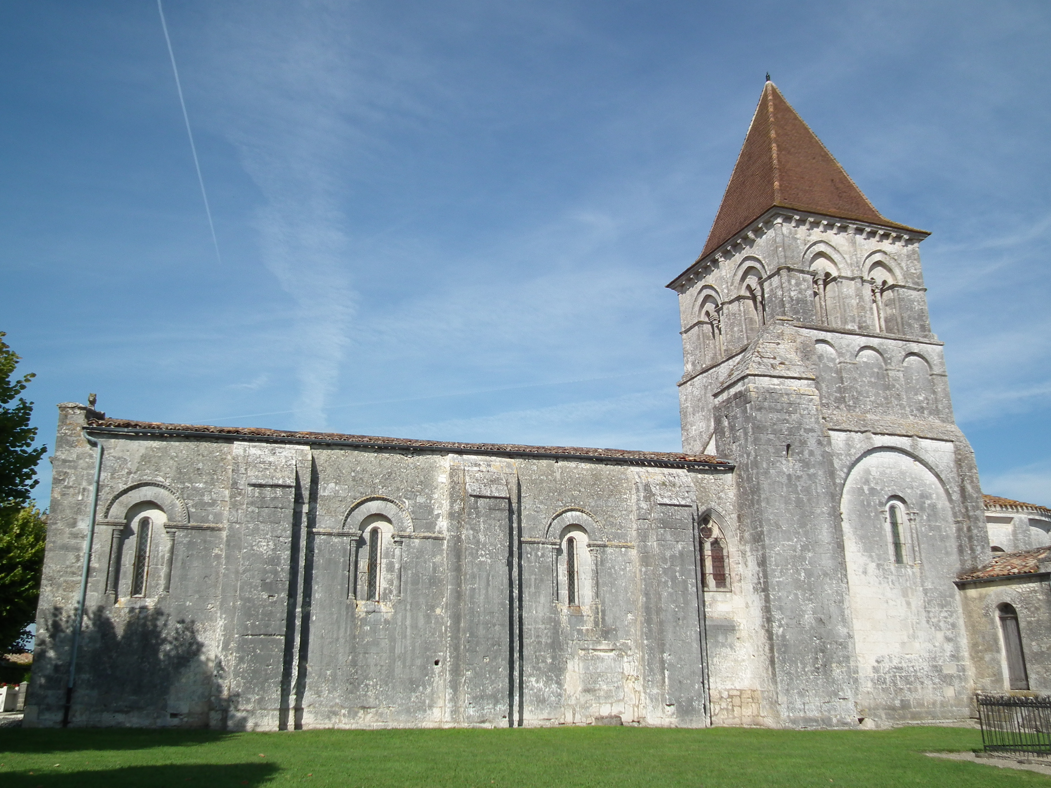 L'église romane de Neuillac